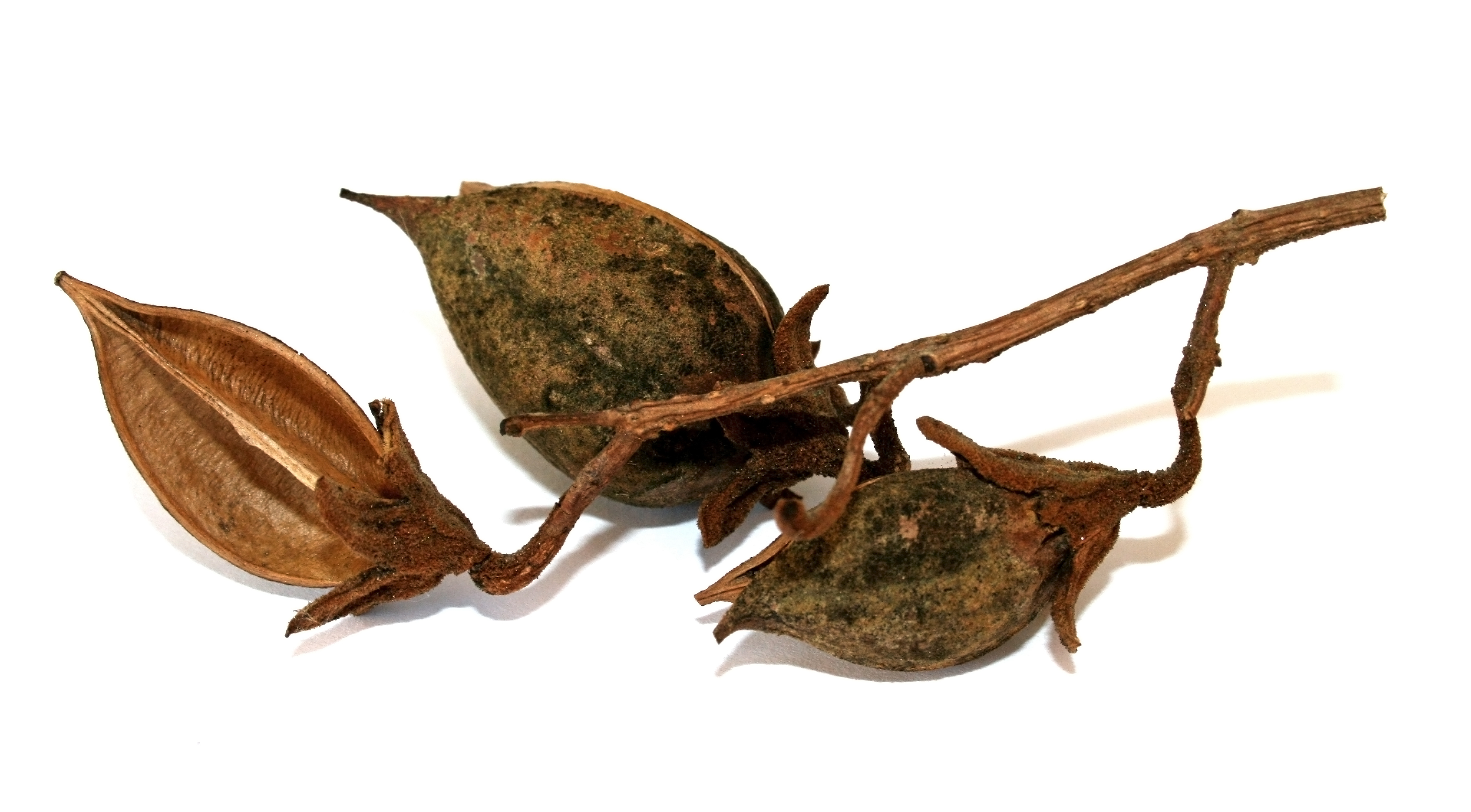 Kapselfrucht der Paulownia (bereits geöffnet)